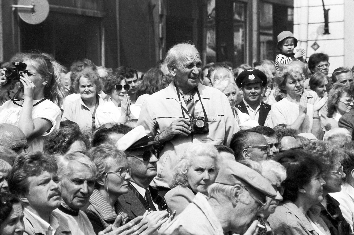 Artur-Mihail Rätsep, eesti ajakirjanik, I Ülemaailmsete eesti noorte päevadel 89